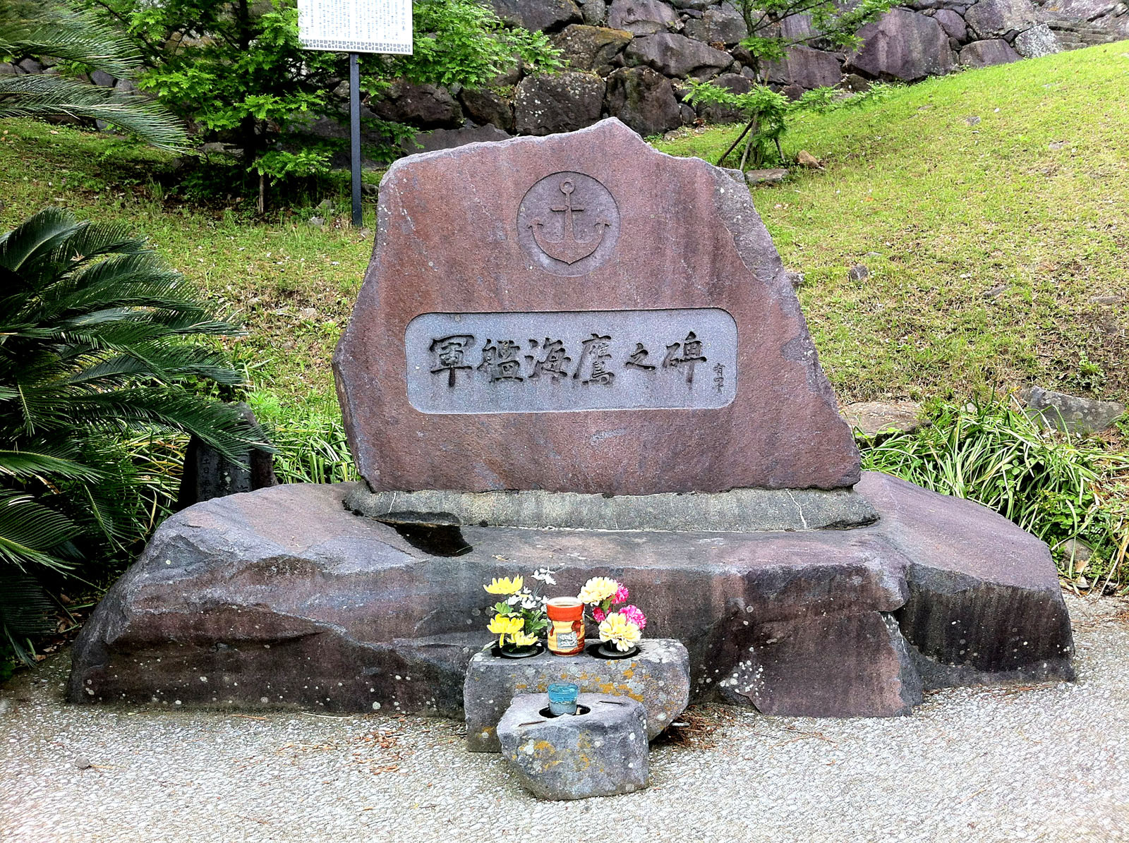 軍艦海鷹之碑（大分県速見郡日出町）